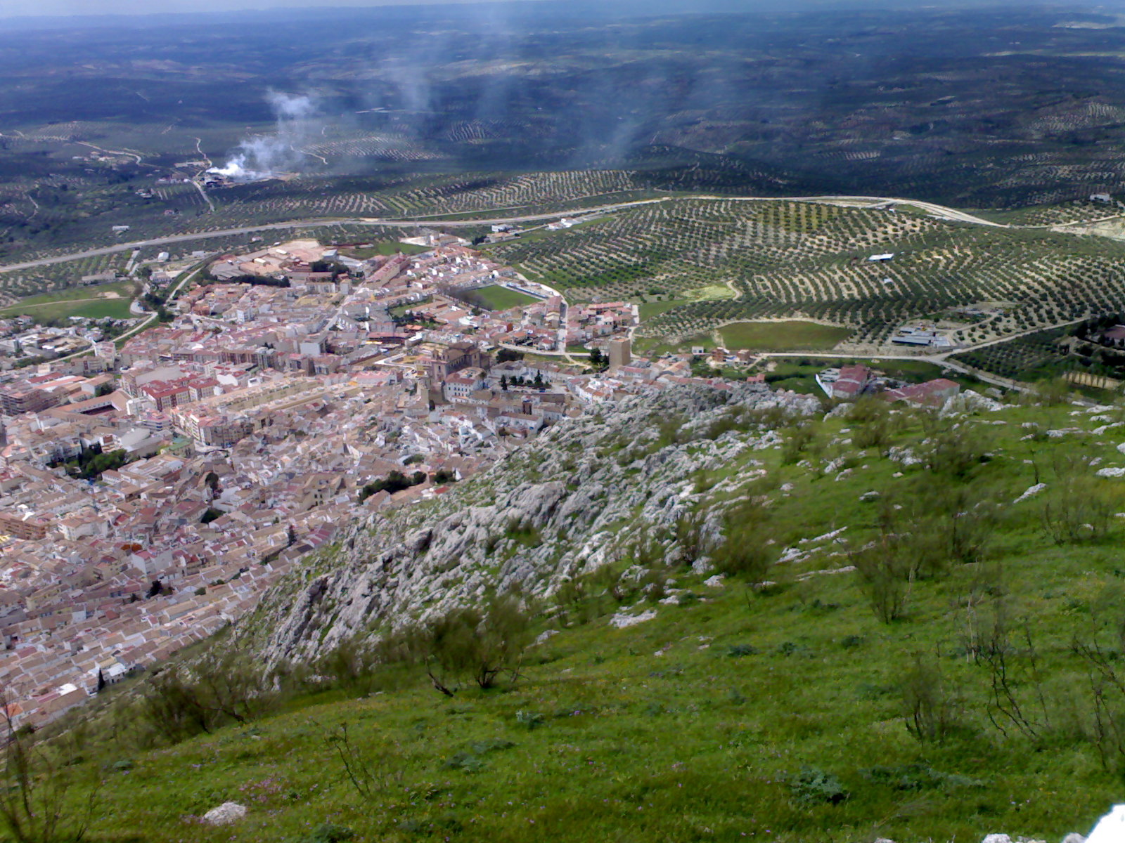 Cima de la Peña de Martos